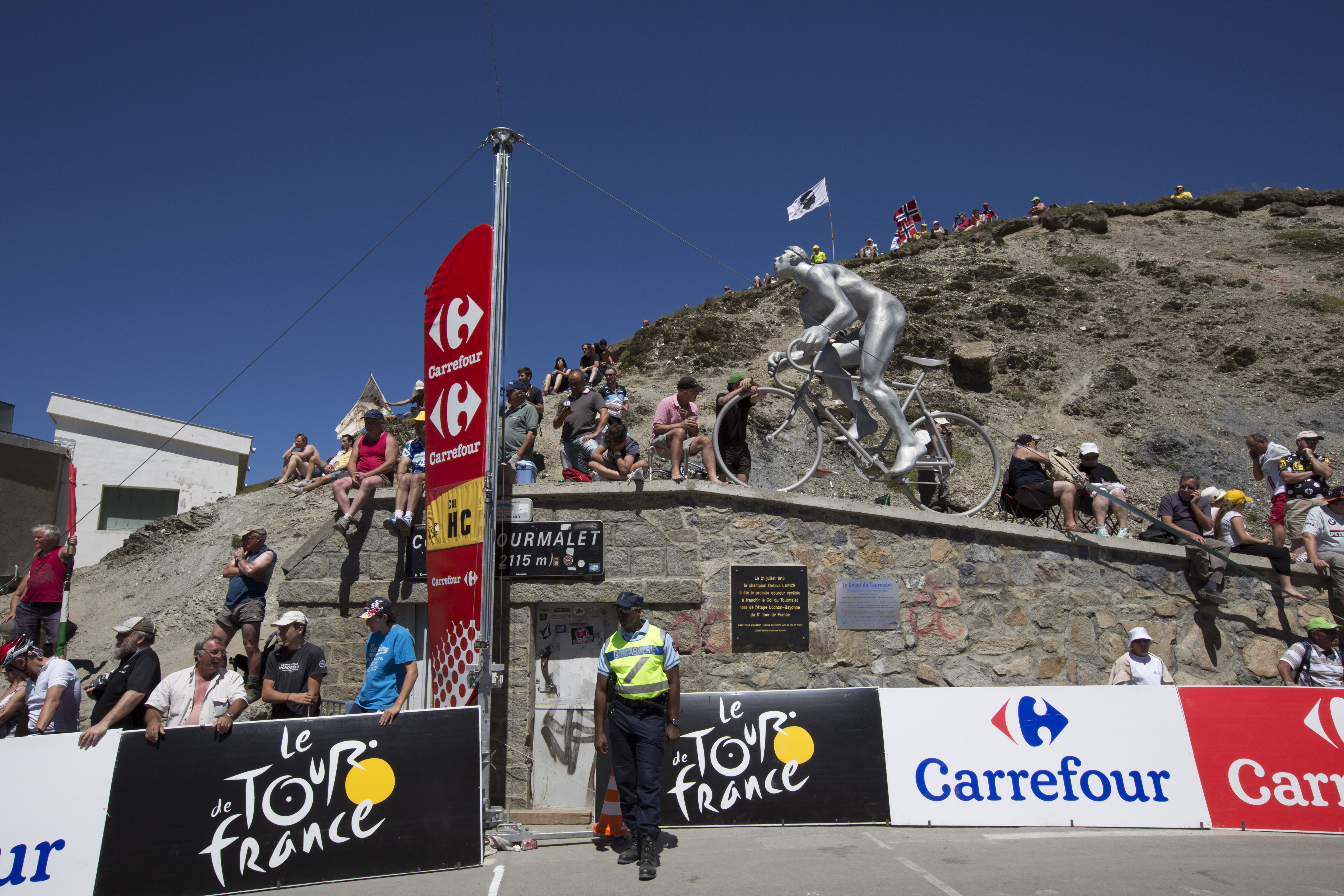 Tourmalet - Tour de France 2012